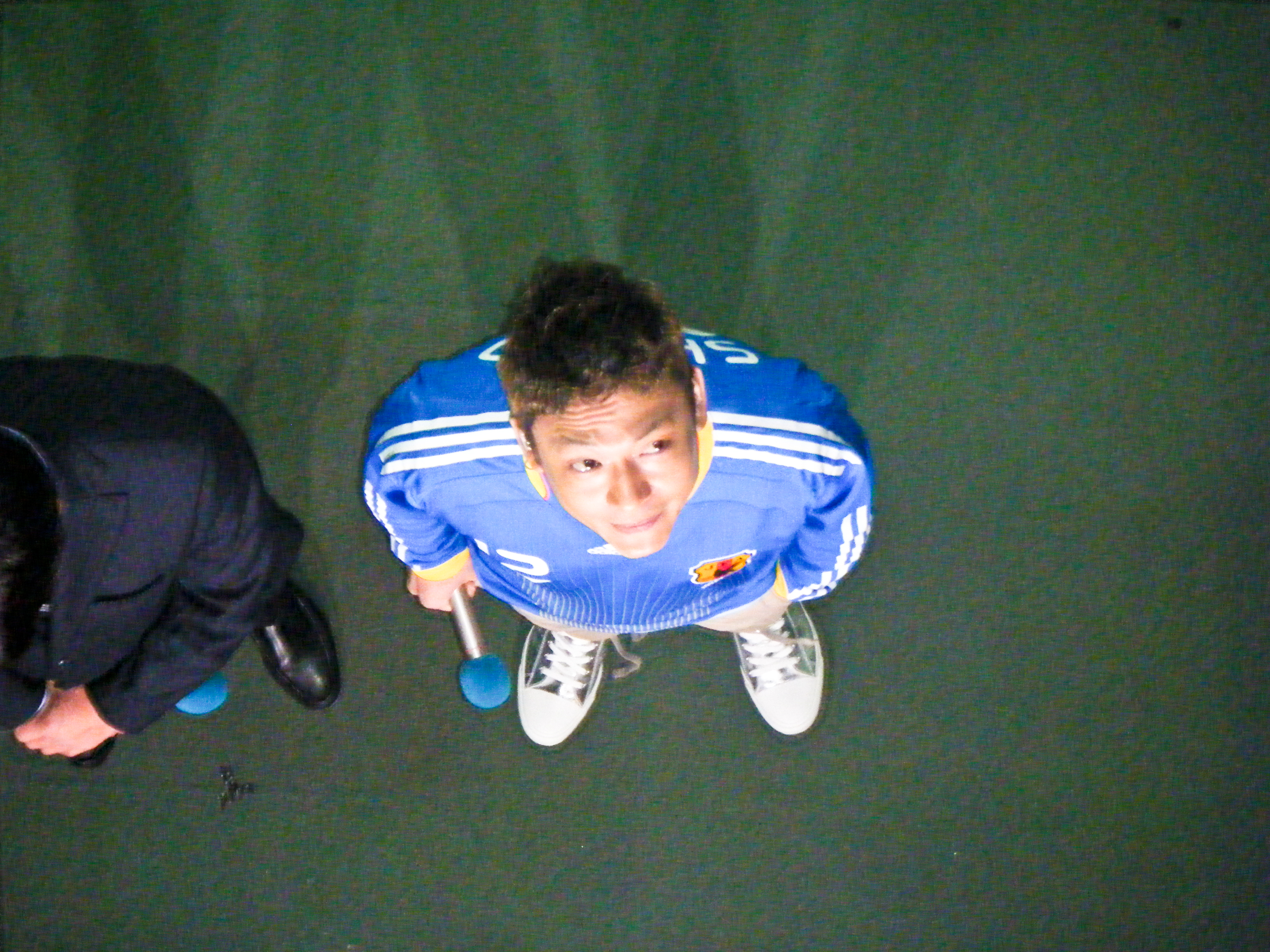 香取慎吾